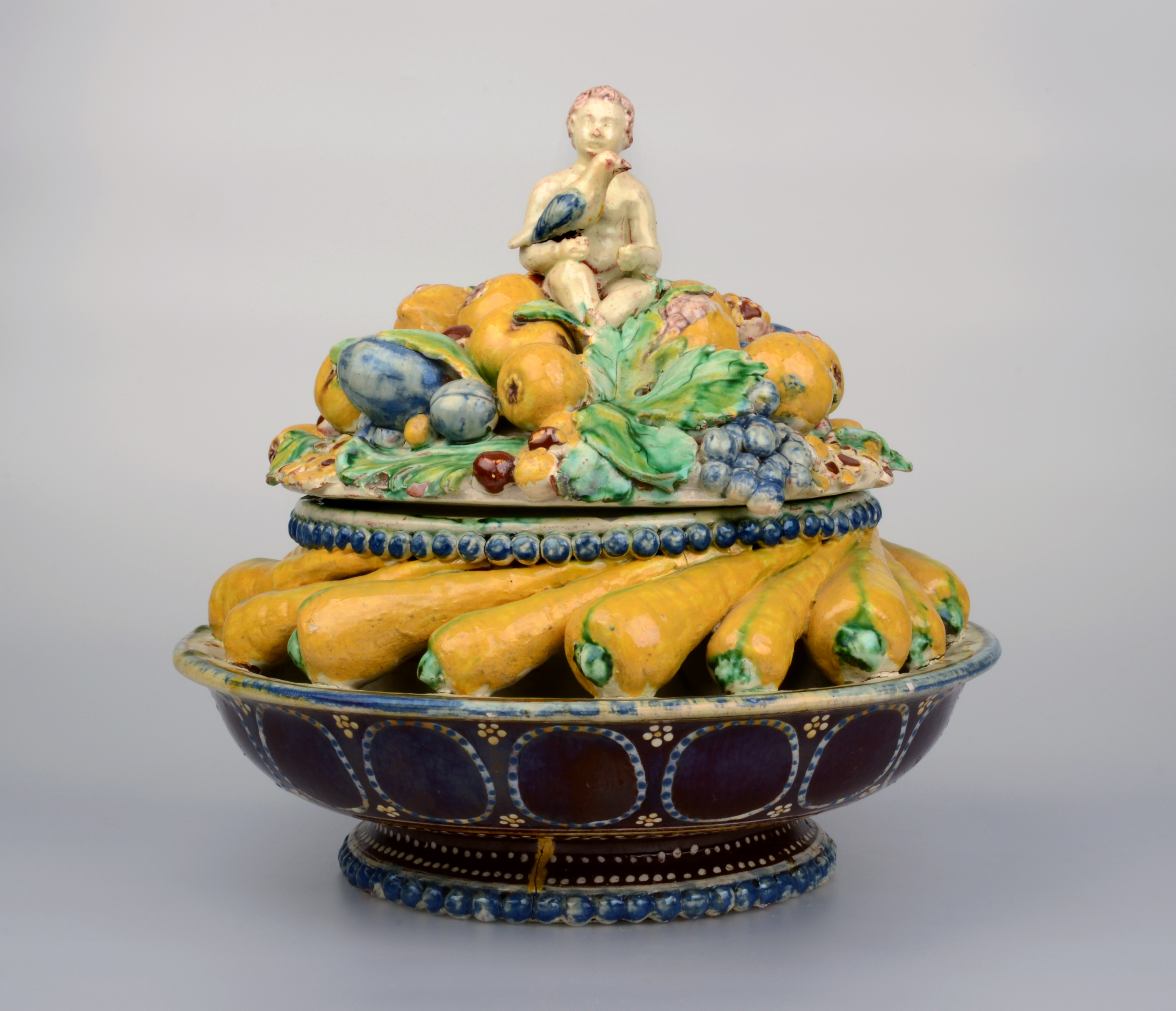 Langnauer Keramik: Terrine bzw. Schauessen, um 1800